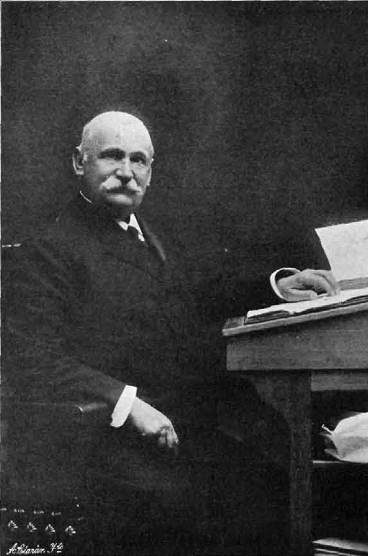 Retrato de Juan Pérez de Guzmán, obra del fotógrafo Kaulak, recogido en la revista española La Ilustración Española y Americana.